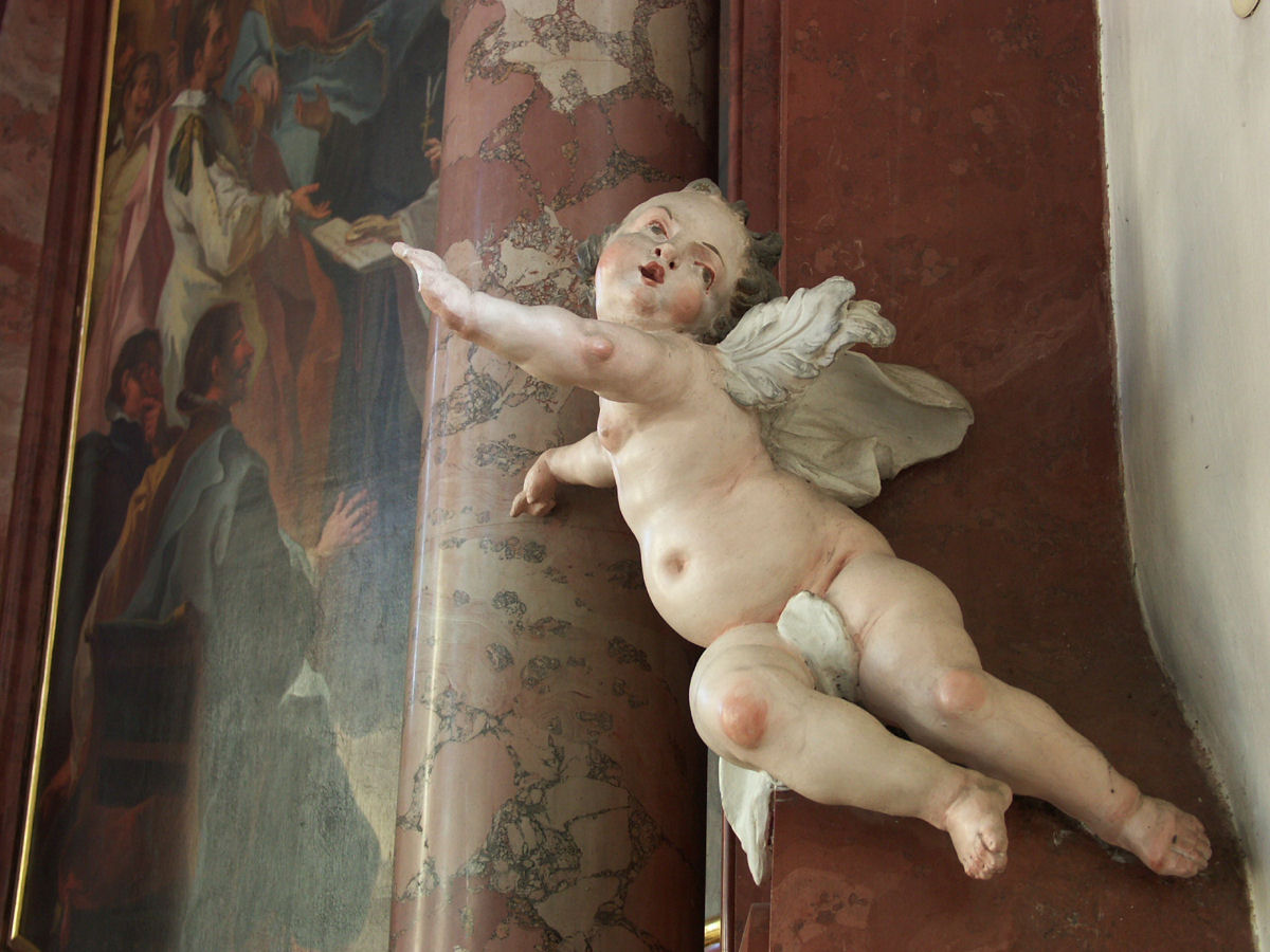 St. Remigius, Merdingen, Germany